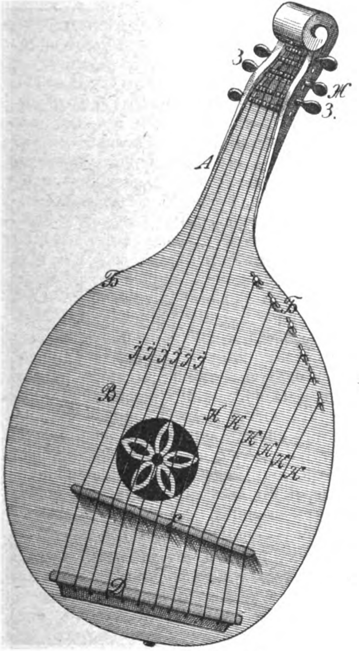 Кобза — бандура. Зоря, 1894, 01, с. 19